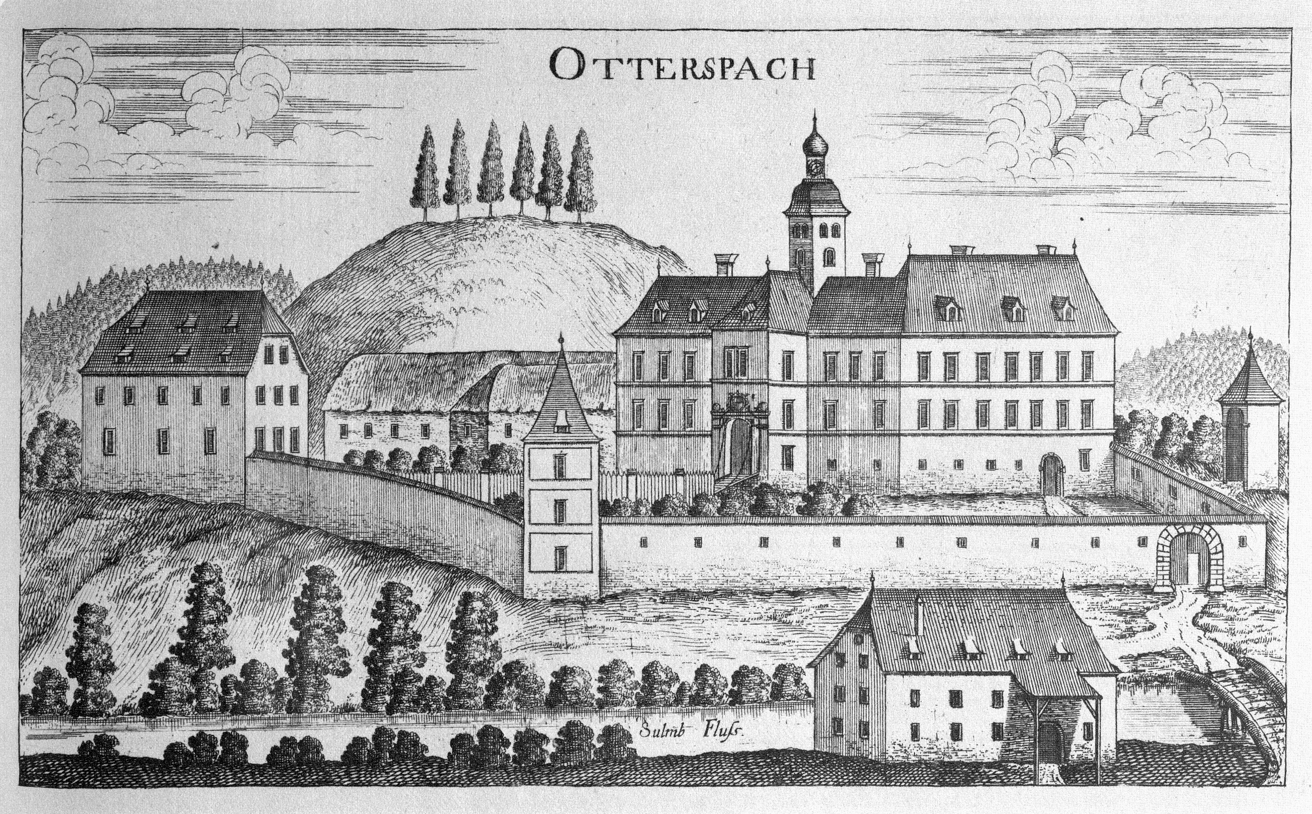 G. M. Vischers Käyserlichen Geographi, Topographia Ducatus Stiriae, Das ist: Eigentliche Delineation / und Abbildung aller Städte / Schlösser / Marcktfleck / Lustgärten / Probsteyen / Stiffter / Clöster und Kirchen / so es sich im Herzogthumb Steyrmarck befinden; Und anjetzo Umb einen billichen Preyß zu finden seynd Bey Johann Bitsch Universitäts Buchhandlern / Auff dem Juden=Platz bey der guldenen Saulen. Graz 1681 Die Nummerierung der Dateien folgt der alphabetischen Reihung der Ortsnamen und entspricht nicht dem Vischer-Register